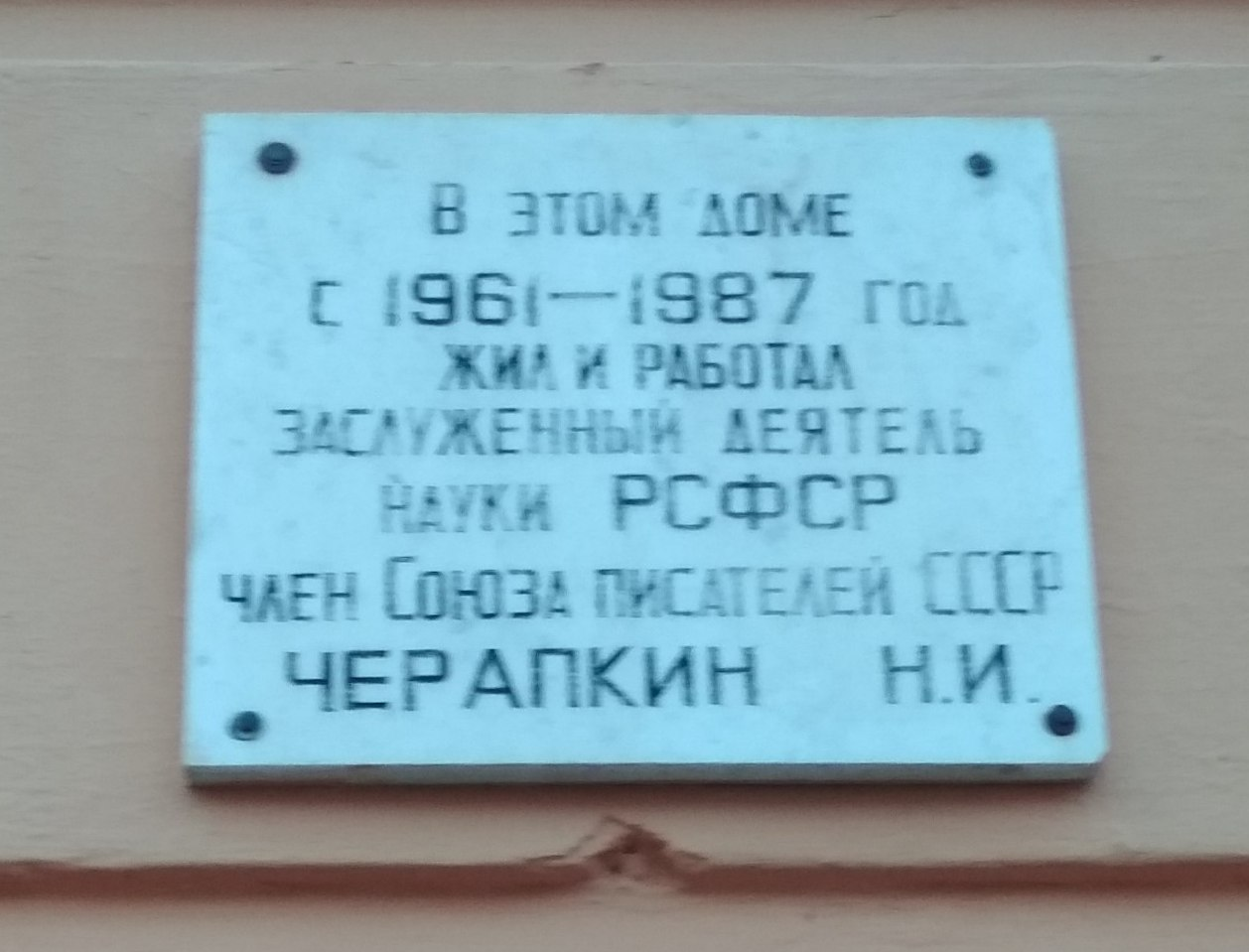 Памятная доска Черапкину Николаю Иосифовичу на доме по адресу г. Саранск ул. Льва Толстого, 8